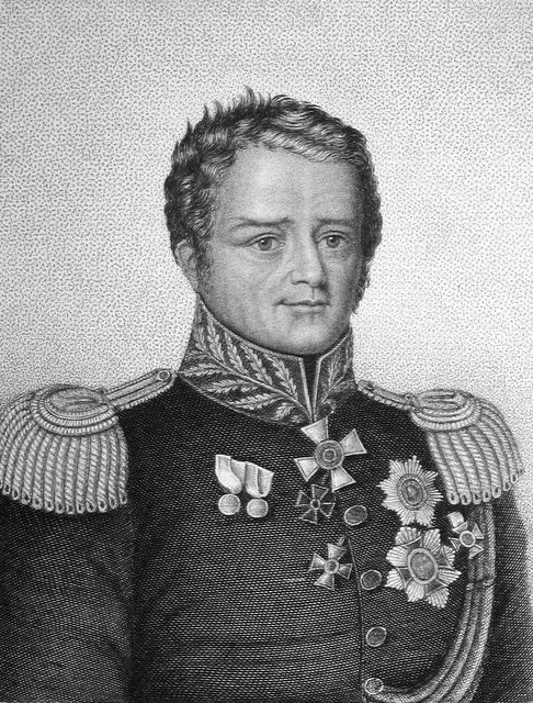 Iwan Fjodorowitsch Paskewitsch